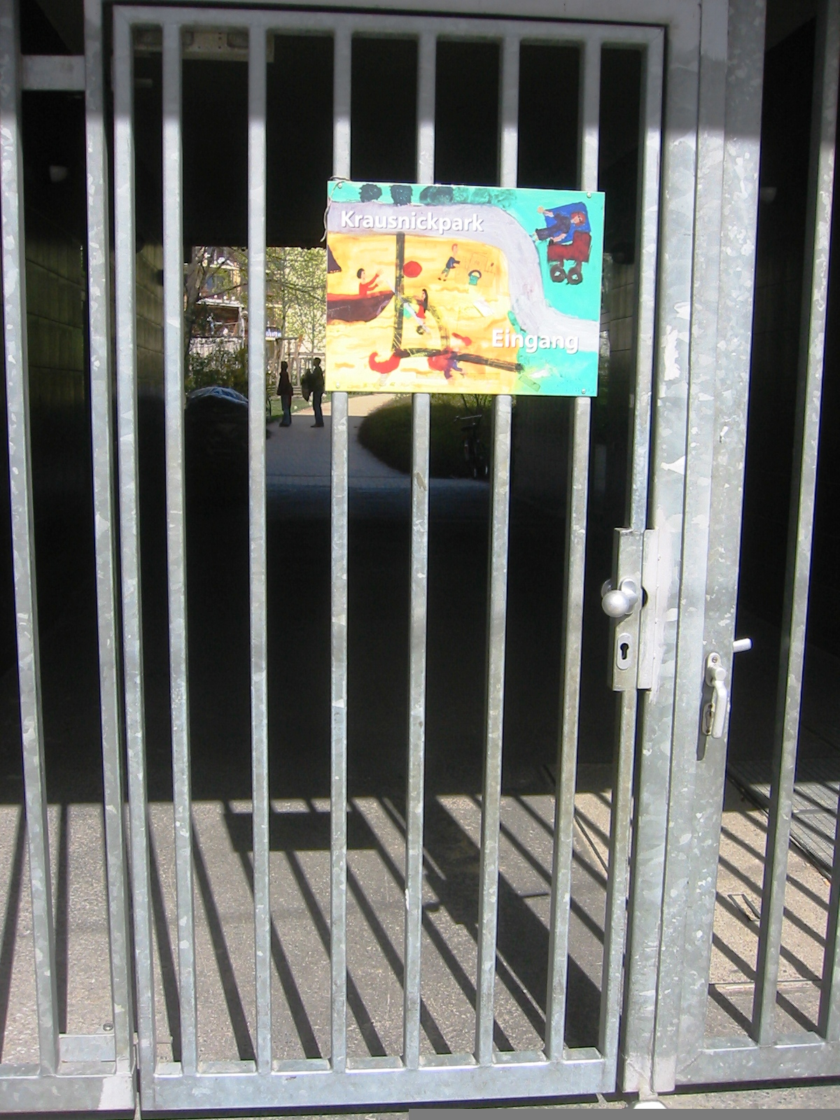 Berlin-Mitte Krausnickpark Eingang